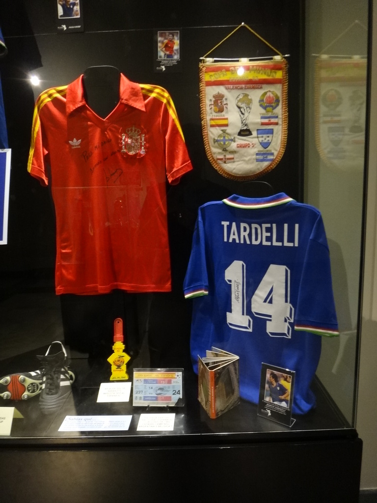 Exposición ‘De Uruguay a Sudáfrica’, Jerez de la Frontera (Andalucía, España)